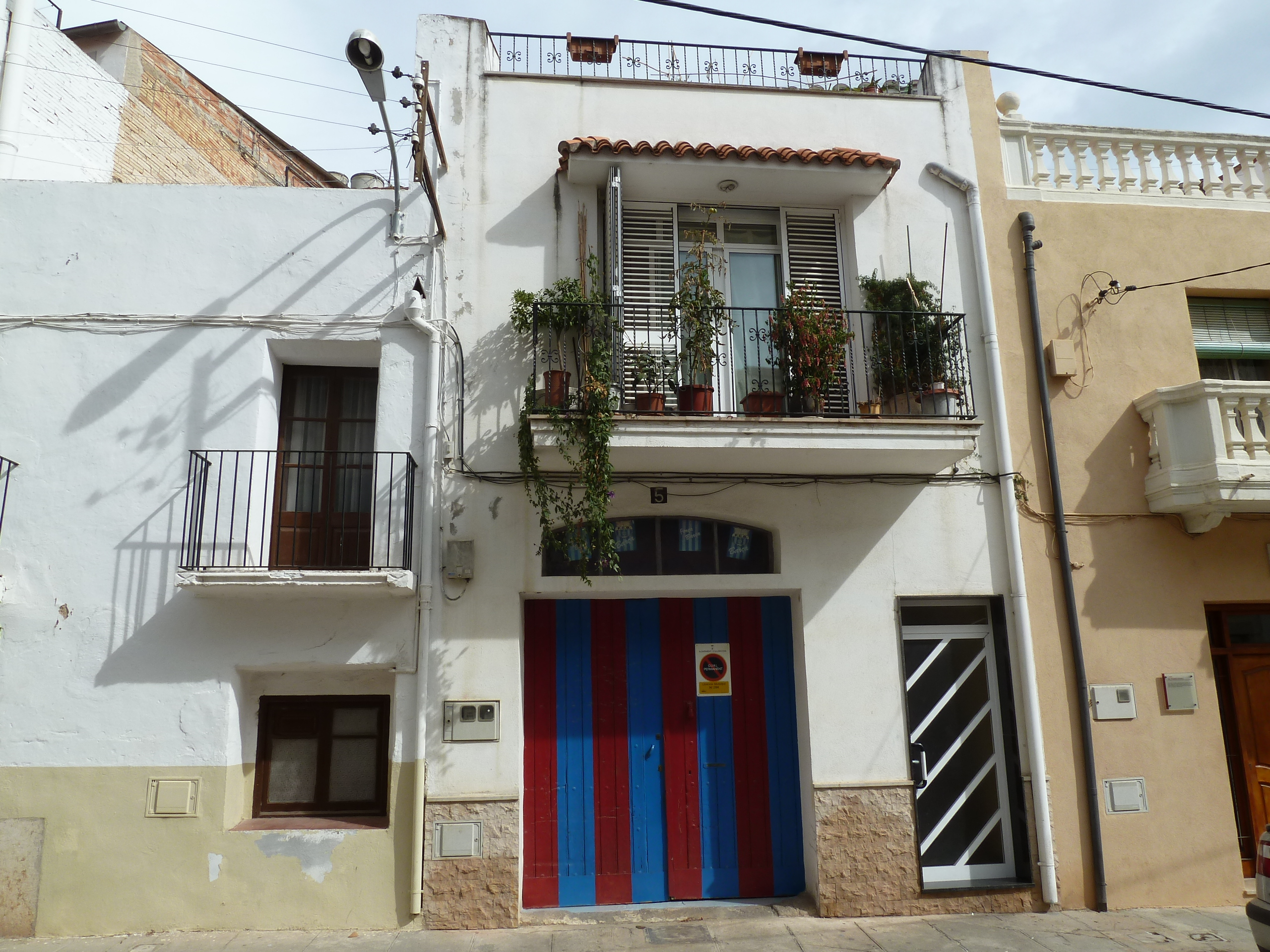 Habitatge al carrer Francesc Sans Borja, 5 (Ulldecona)